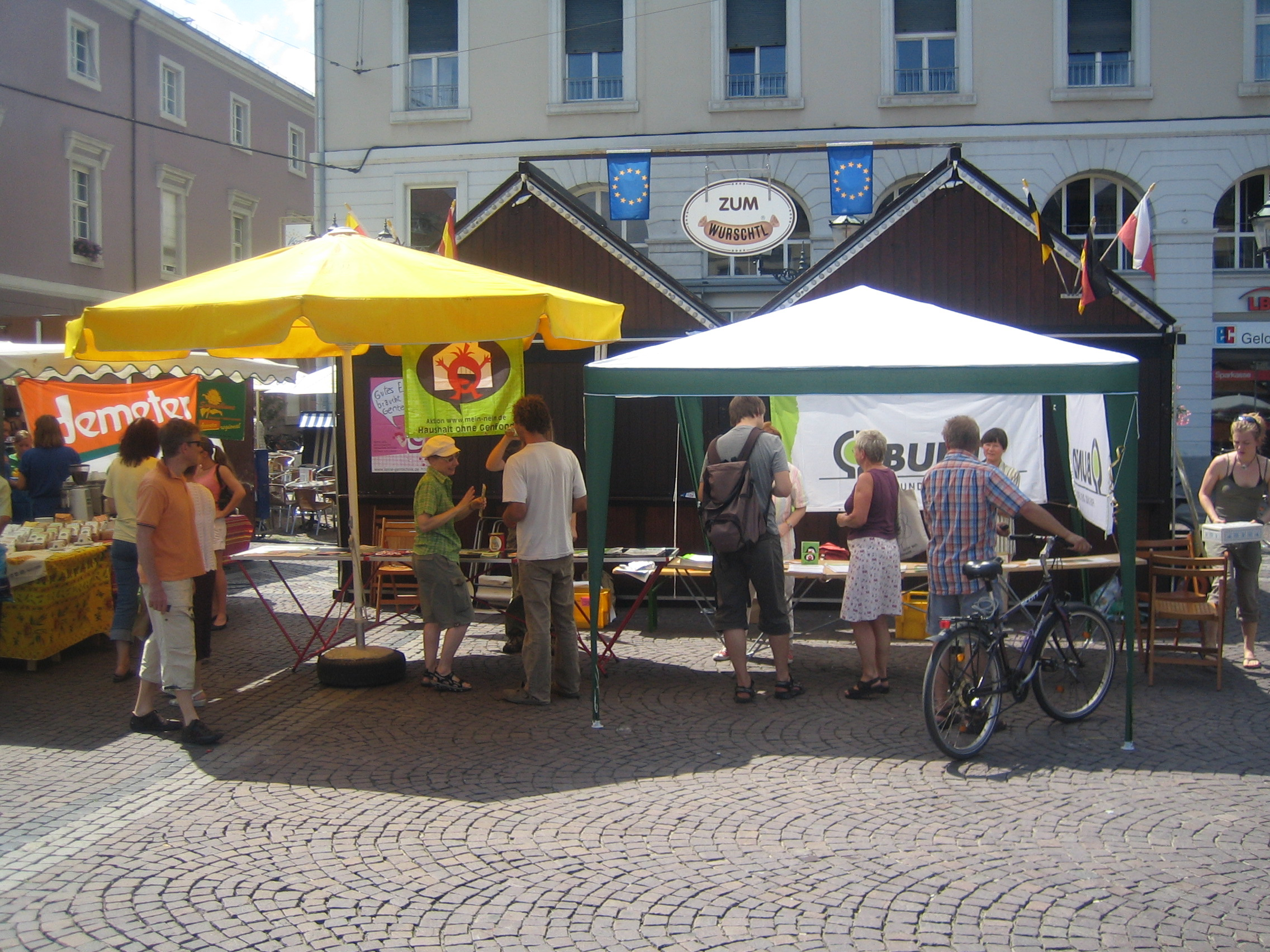 Infostand des BUND bei einer Antigentechnikdemo im Karlsruhe.